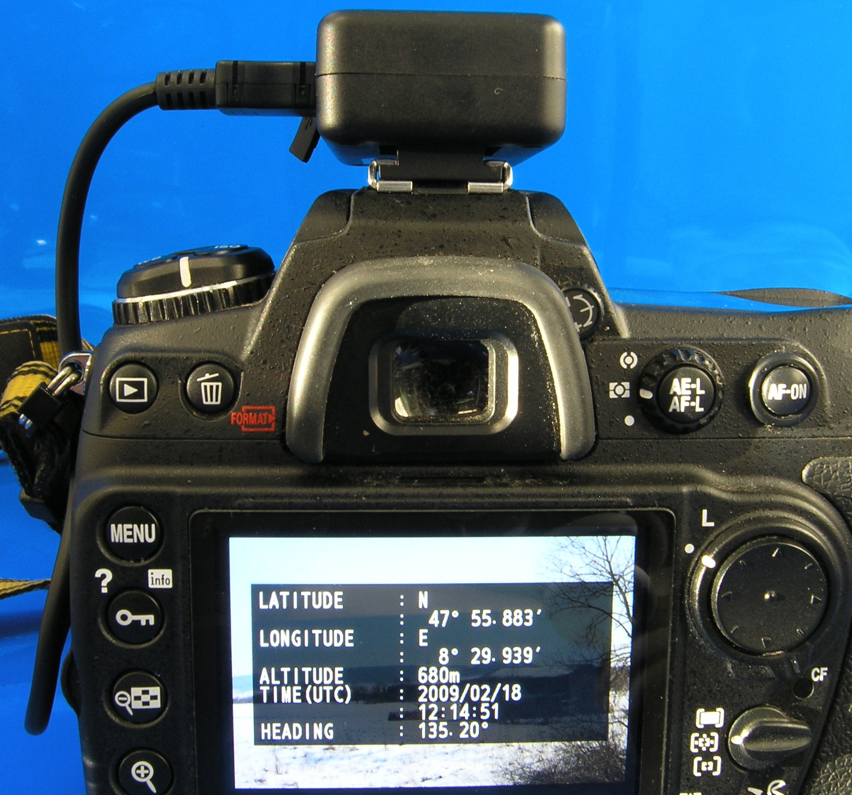 Solmeta Geotagger N2 Kompass, Foto-GPS für diverse GPS-fähige Nikon DSLR. Die Geo-Informationen werden direkt bei Aufnahme in die Bilddatei gespeichert.